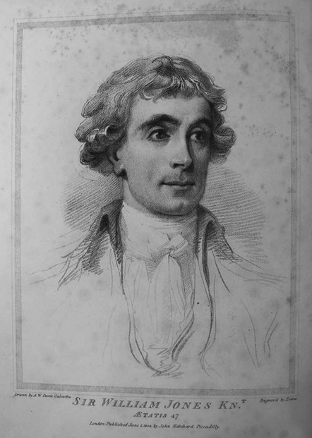 Abgebildet ist William Jones in der 1804 von John Shore veröffentlichten Biografie "Memoirs, of the life, writings and correspondence of Sir William Jones"